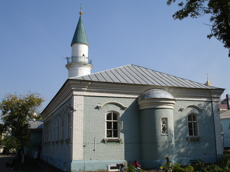 Соборная мечеть г. Оренбург, Россия